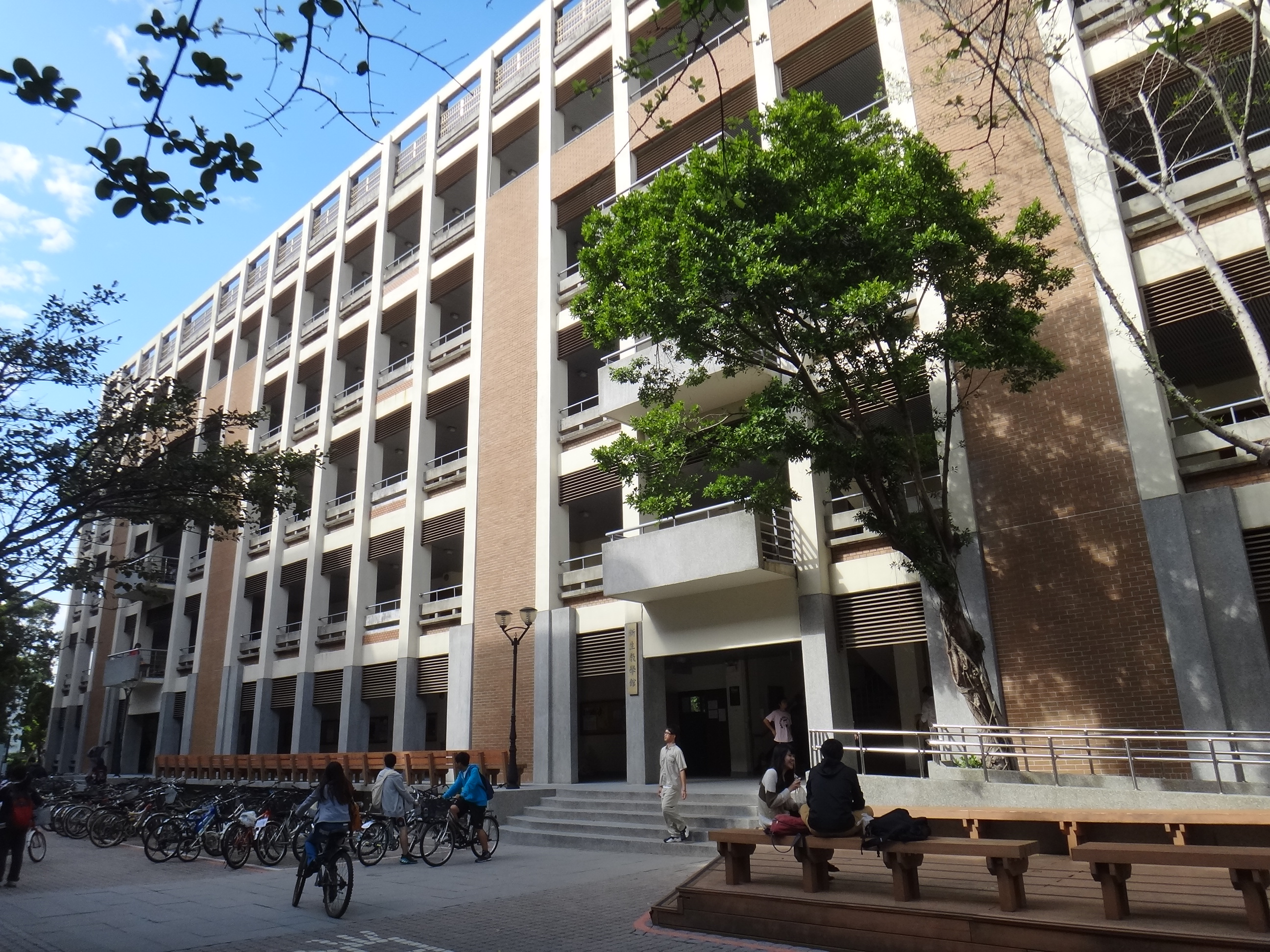 中文（台灣）: 新生教學館，原名新生大樓。